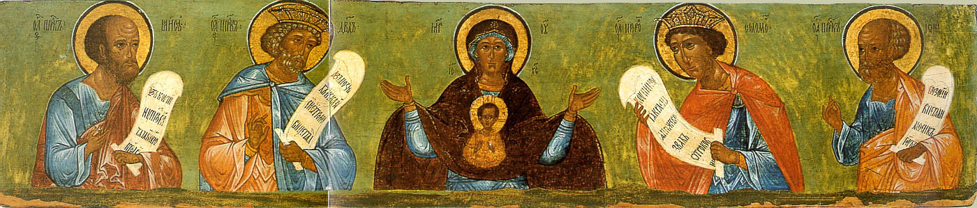 Пророческий чин. Россия. Первая половина XVI века. Дерево темпера. Размер - 26,5 х 126 см. В центре изображена Богоматерь Воплощение. По сторонам от Неё пророки: слева - Давид и Моисей, справа - Соломон и Иона.